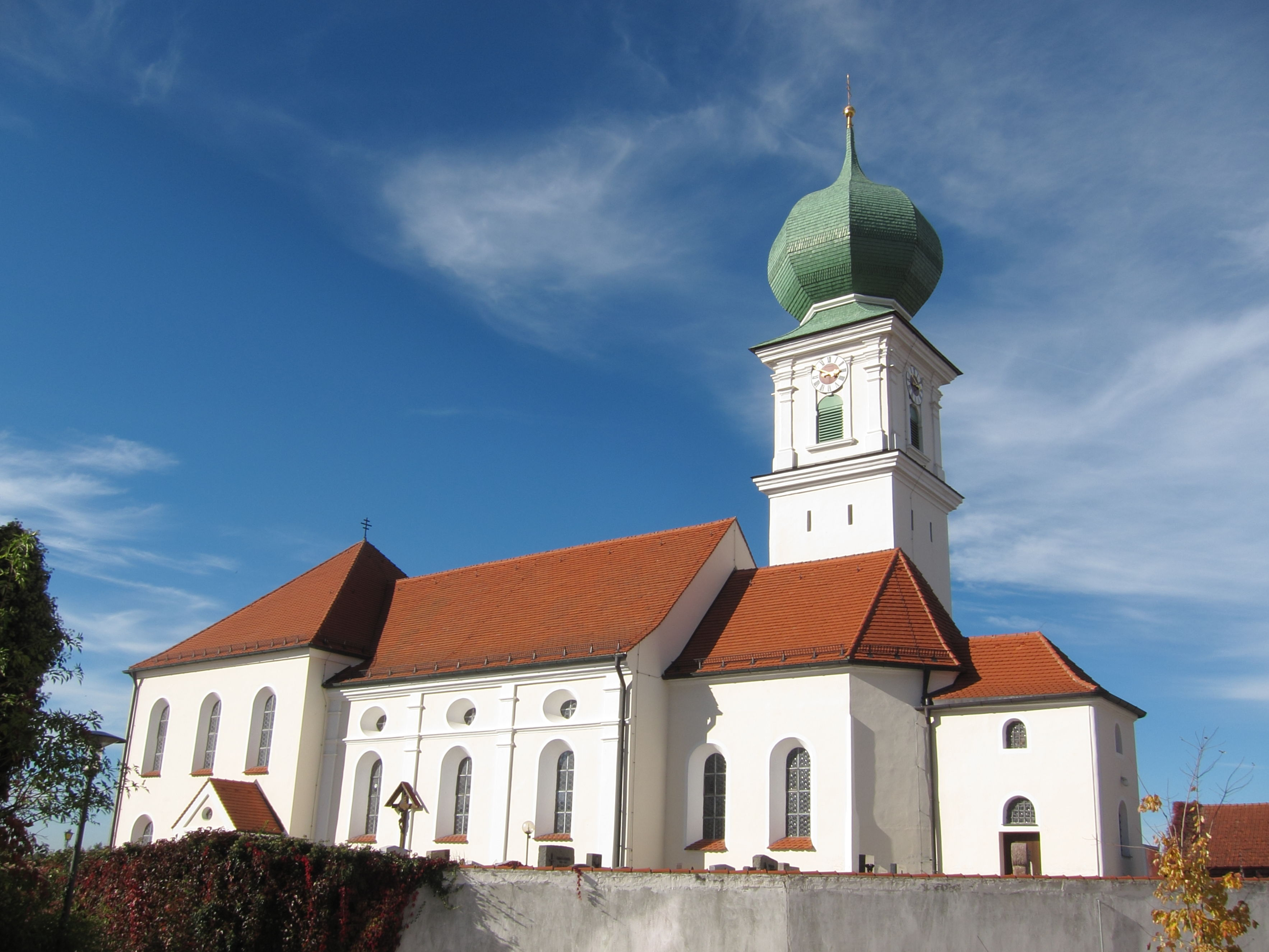 Schröding; katholische Pfarrkirche St. Urban und Nikolaus, Saalbau mit eingezogenem Polygonalchor, Zwiebelturm und angefügter Sakristei, Chor und Turmunterbau spätgotisch um 1450, Langhaus und Turmoberteil von Anton Kogler barockisiert 1702/03, modern verlängert; mit Ausstattung.